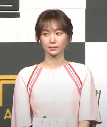 [TV텐] 3월 22일 드라마 '터널' 제작발표회 현장